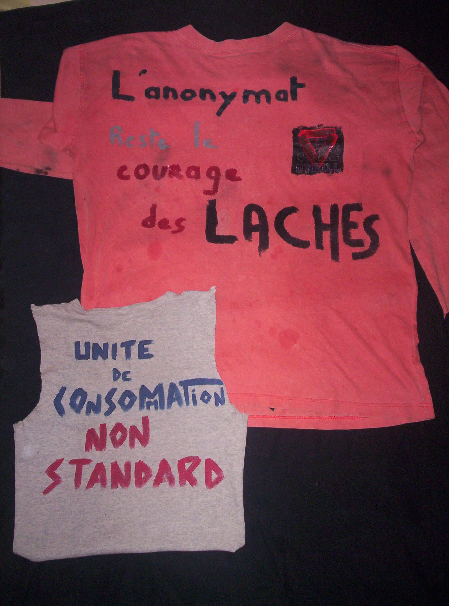 Tee-shirts personnalisés